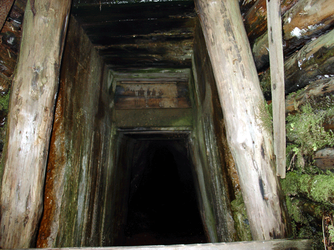 Eingang Silberstollen